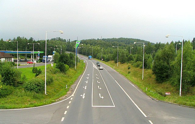 Staré Sedlo, okres Sokolov, silnice I/6 (budoucí R6), obchvat Sokolova, u motelu Sokolov.